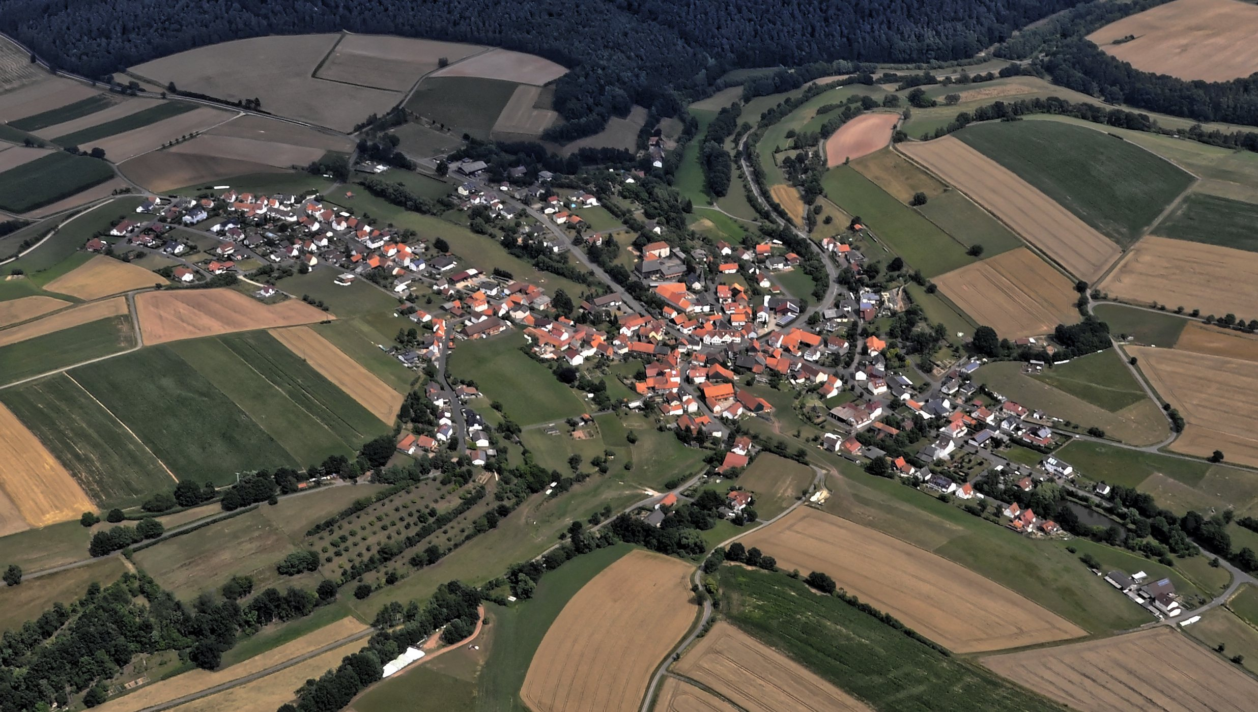 Bilder vom Flug Nordholz-Hammelburg 2015: Hattenbach